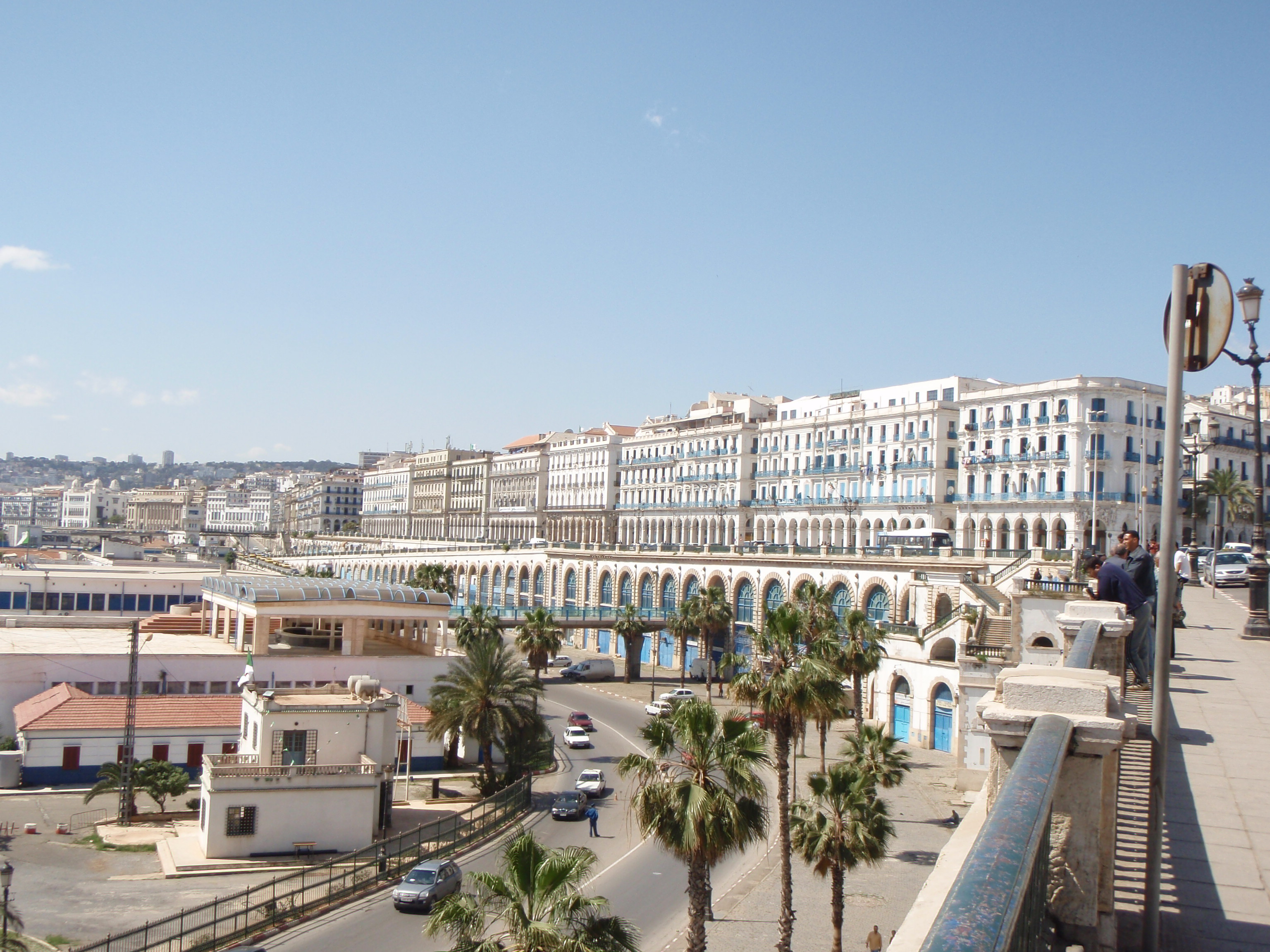 Boulevard front de mer